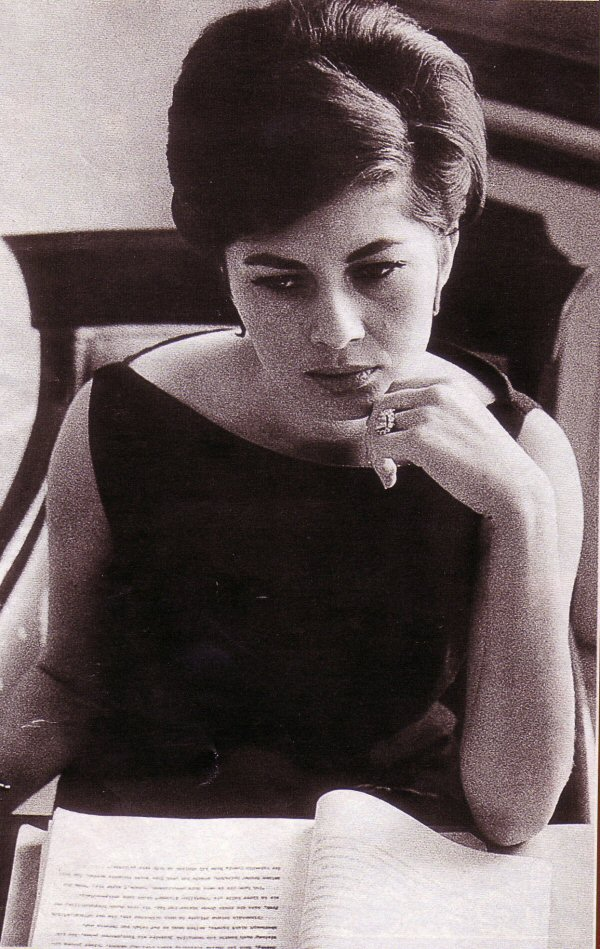 Shahbanu Soraya Esfandiary